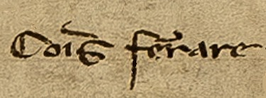 Elba Island